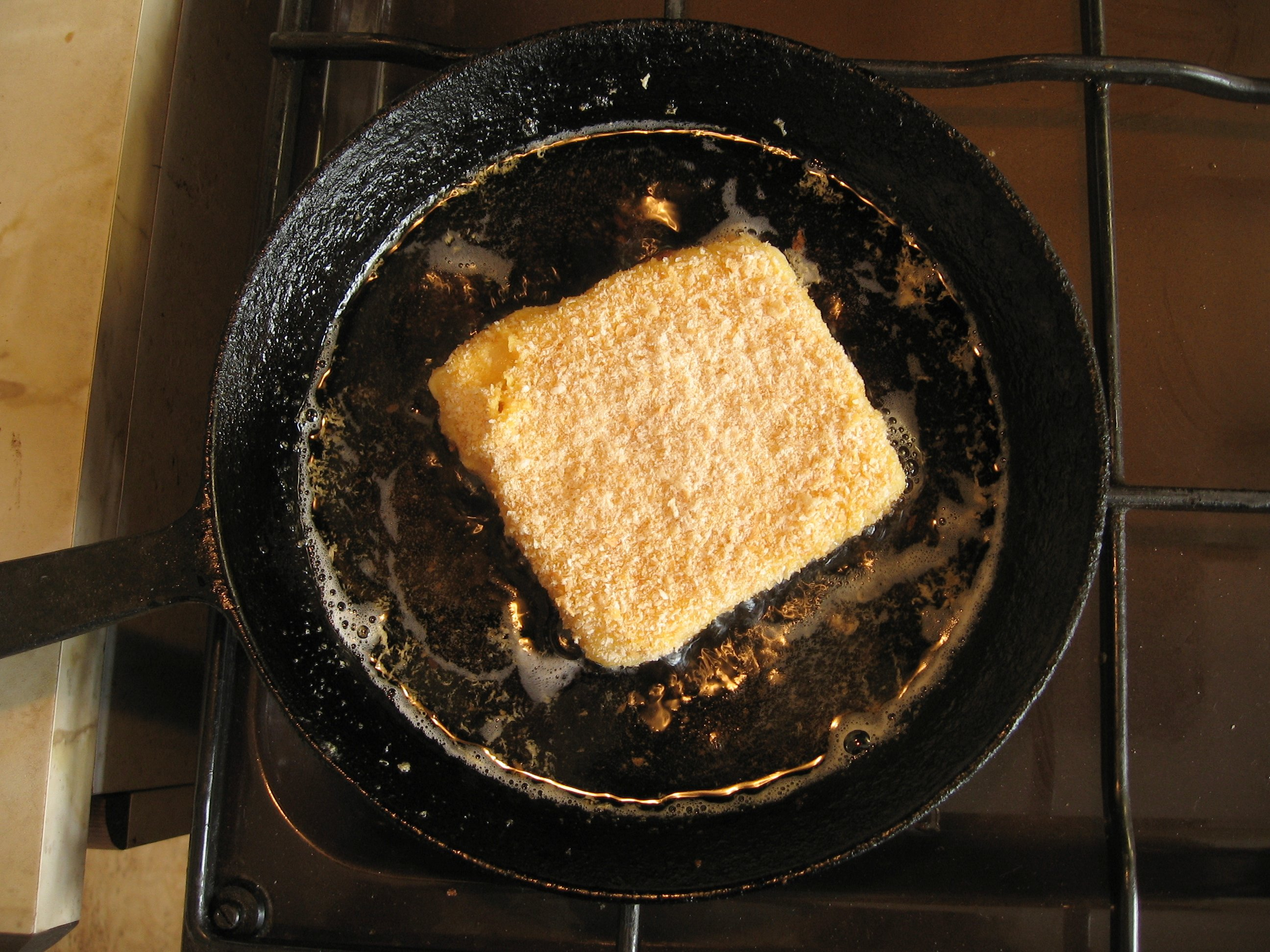 smažení první strany smaženého sýra